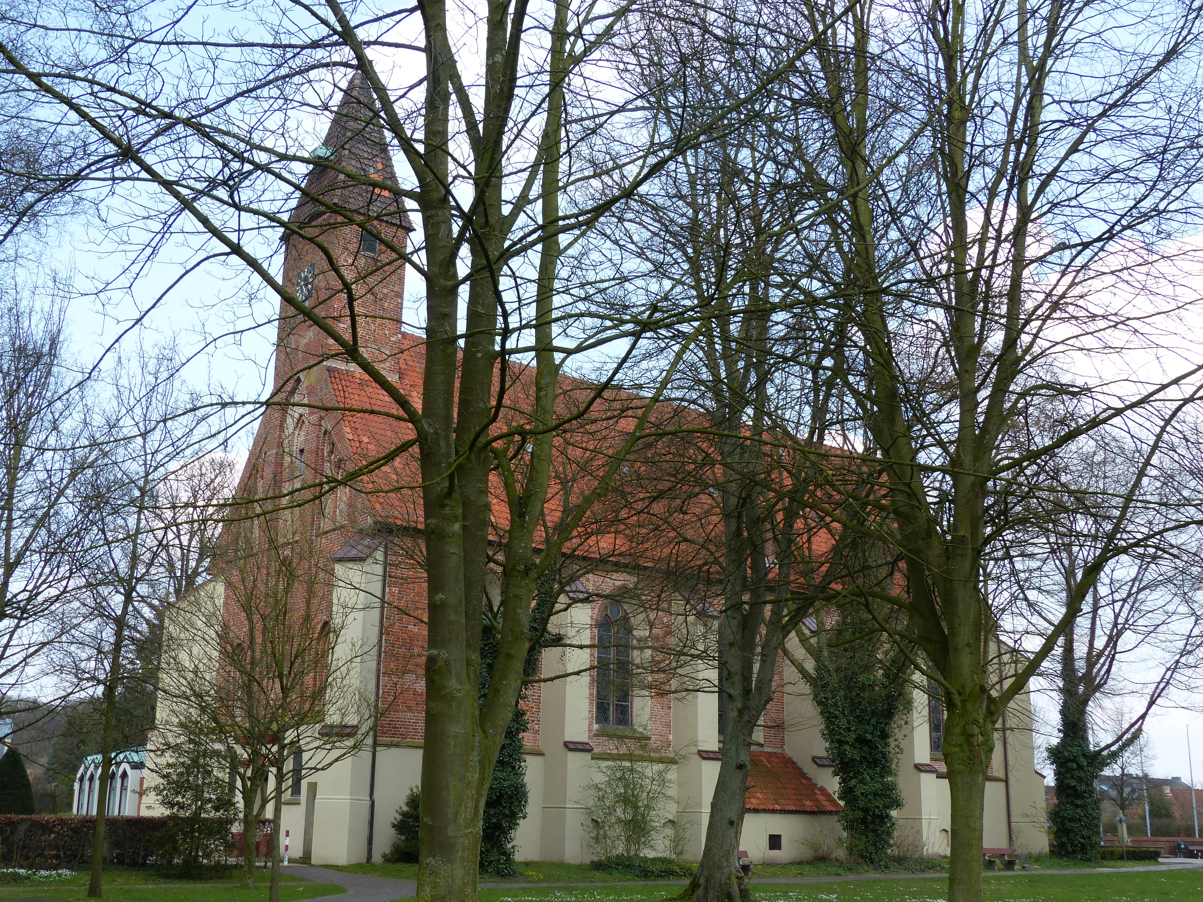 Abteikirche Lilenthal von Südwesten